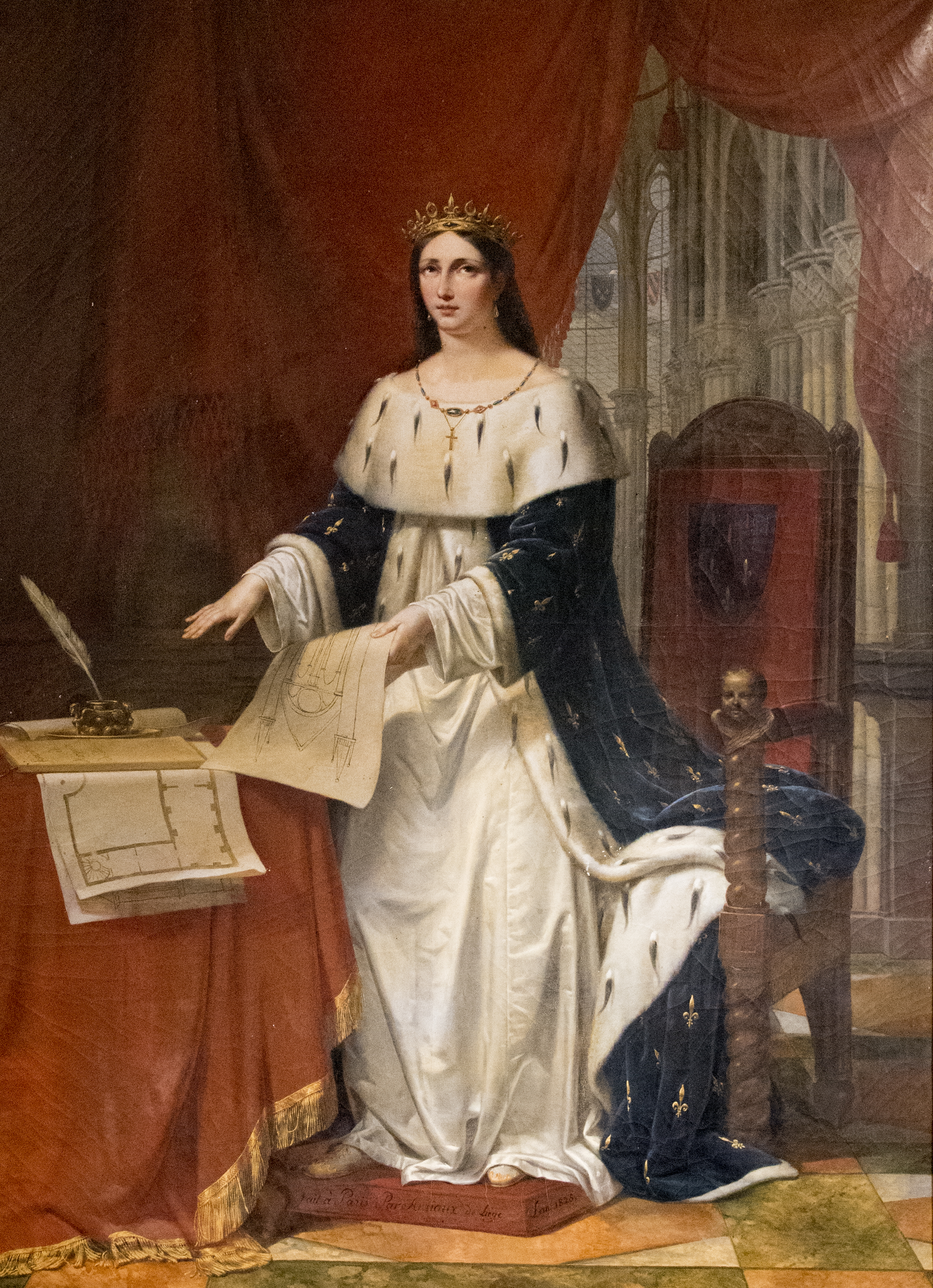 Margaretha van Bourgondië, gravin van Tonnerre